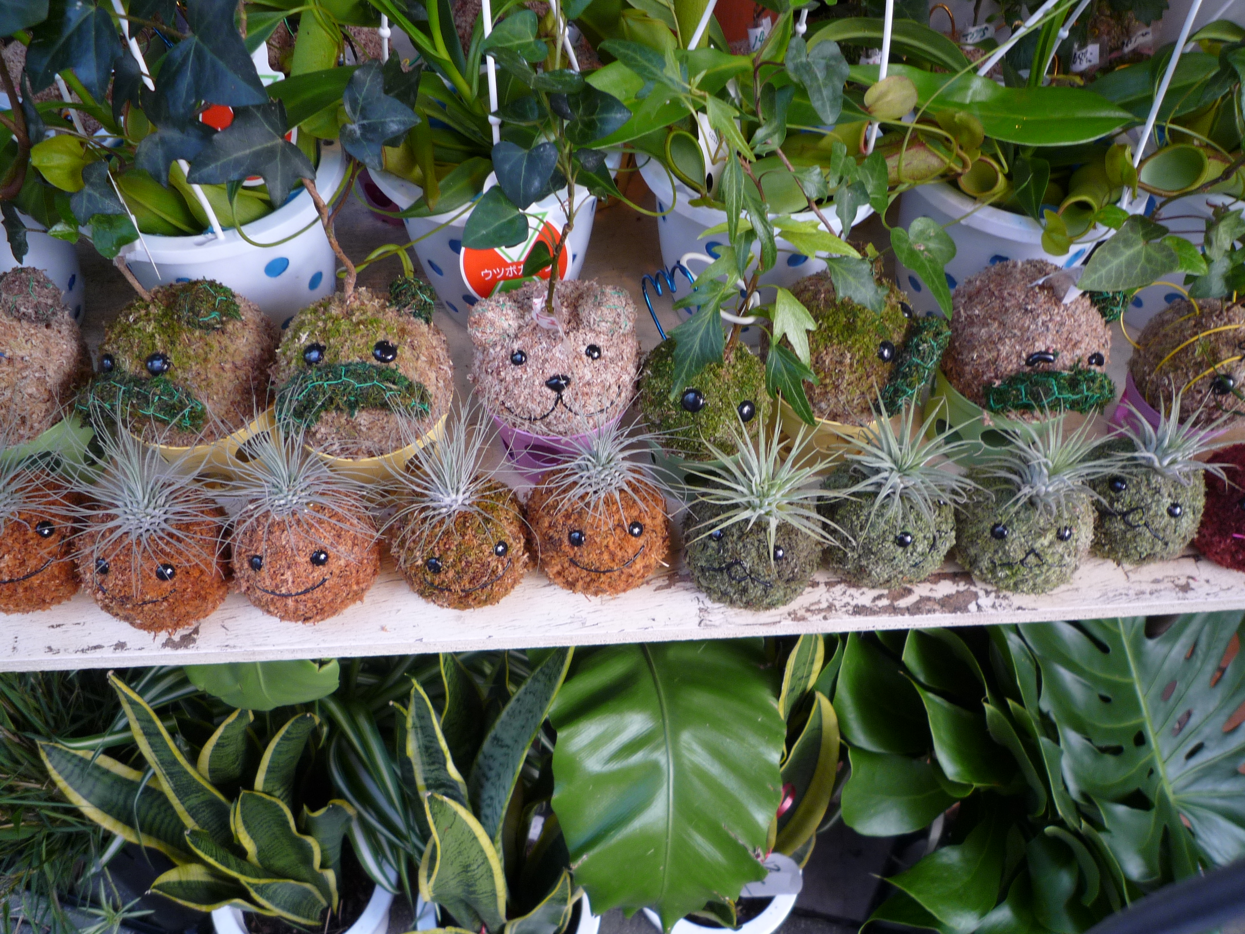 Kokedama animalier en mousse teinte - Japon